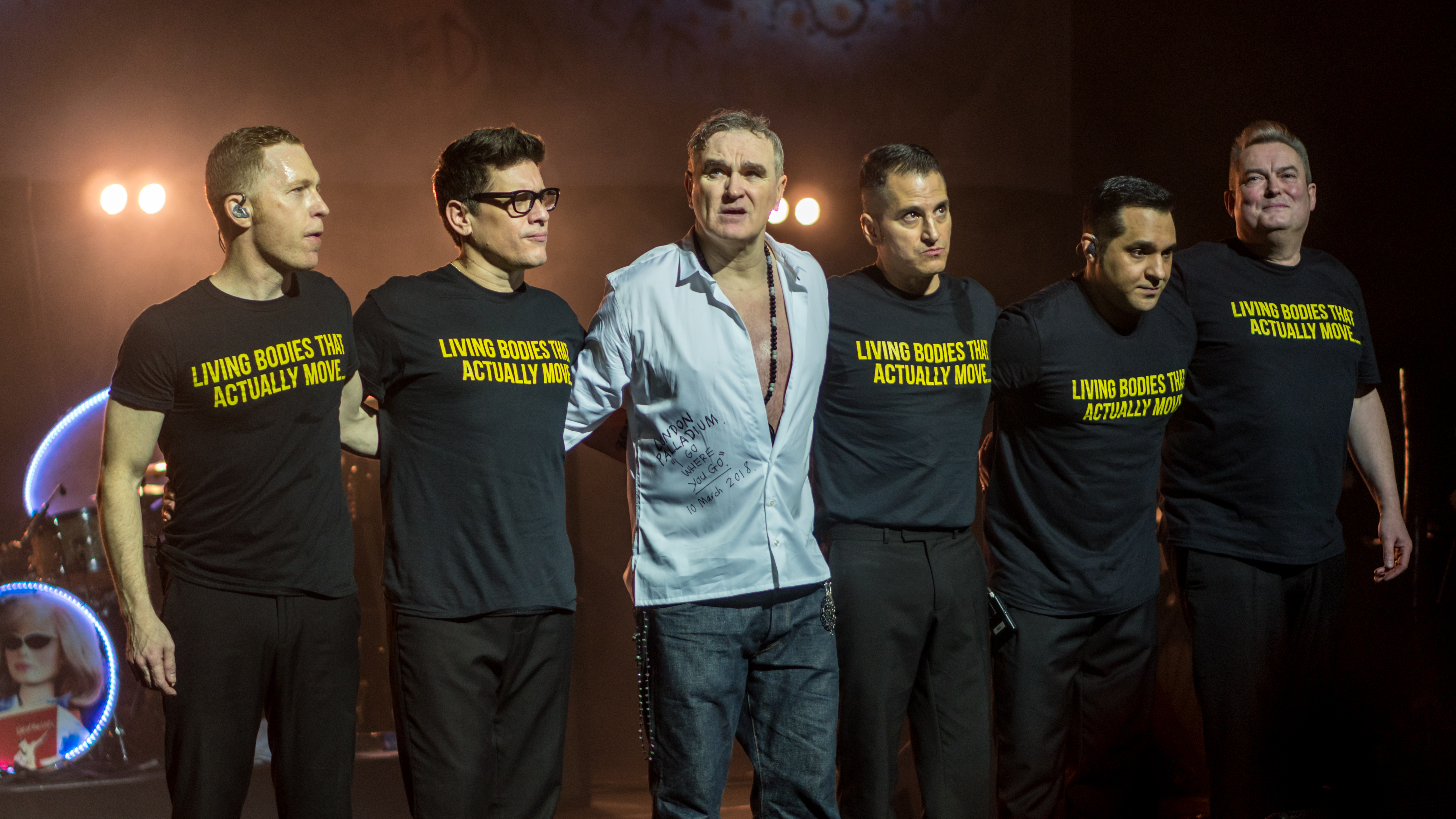 MozPall100318-41